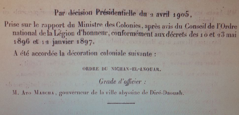 award known in France as legion d'honneur